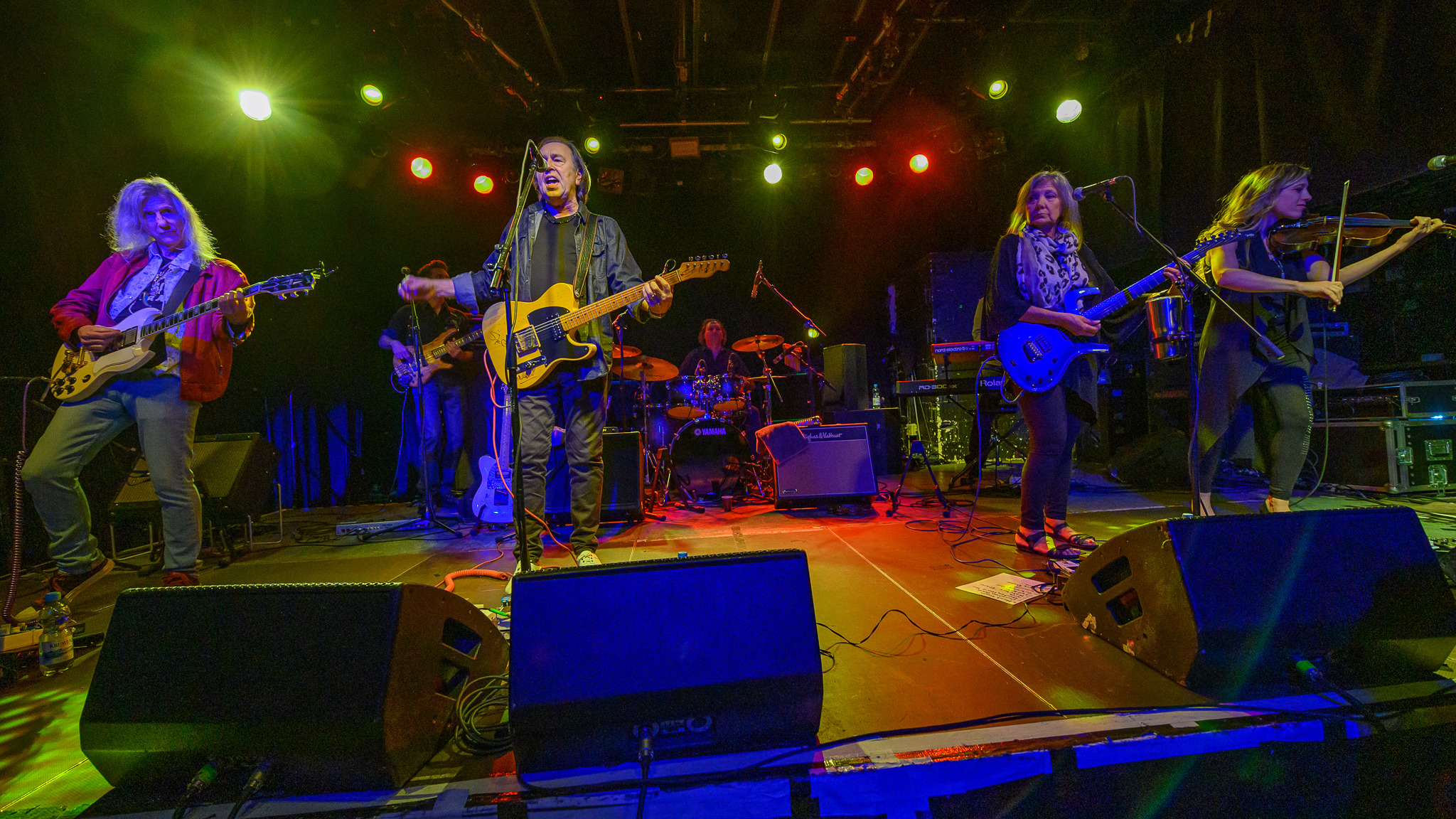 Concertbüro Franken,Der Hirsch,Livekonzert,Livemusik,Pavlov’s Dog